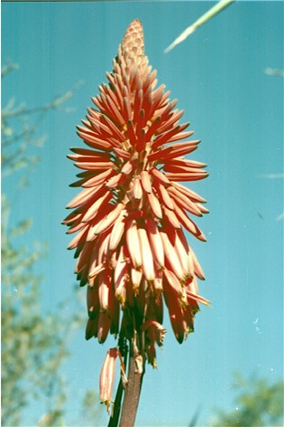 alwijn Deze afbeelding is mijn eigen werk en ik stel haar onder GNU/FDL ter beschikking Jcwf